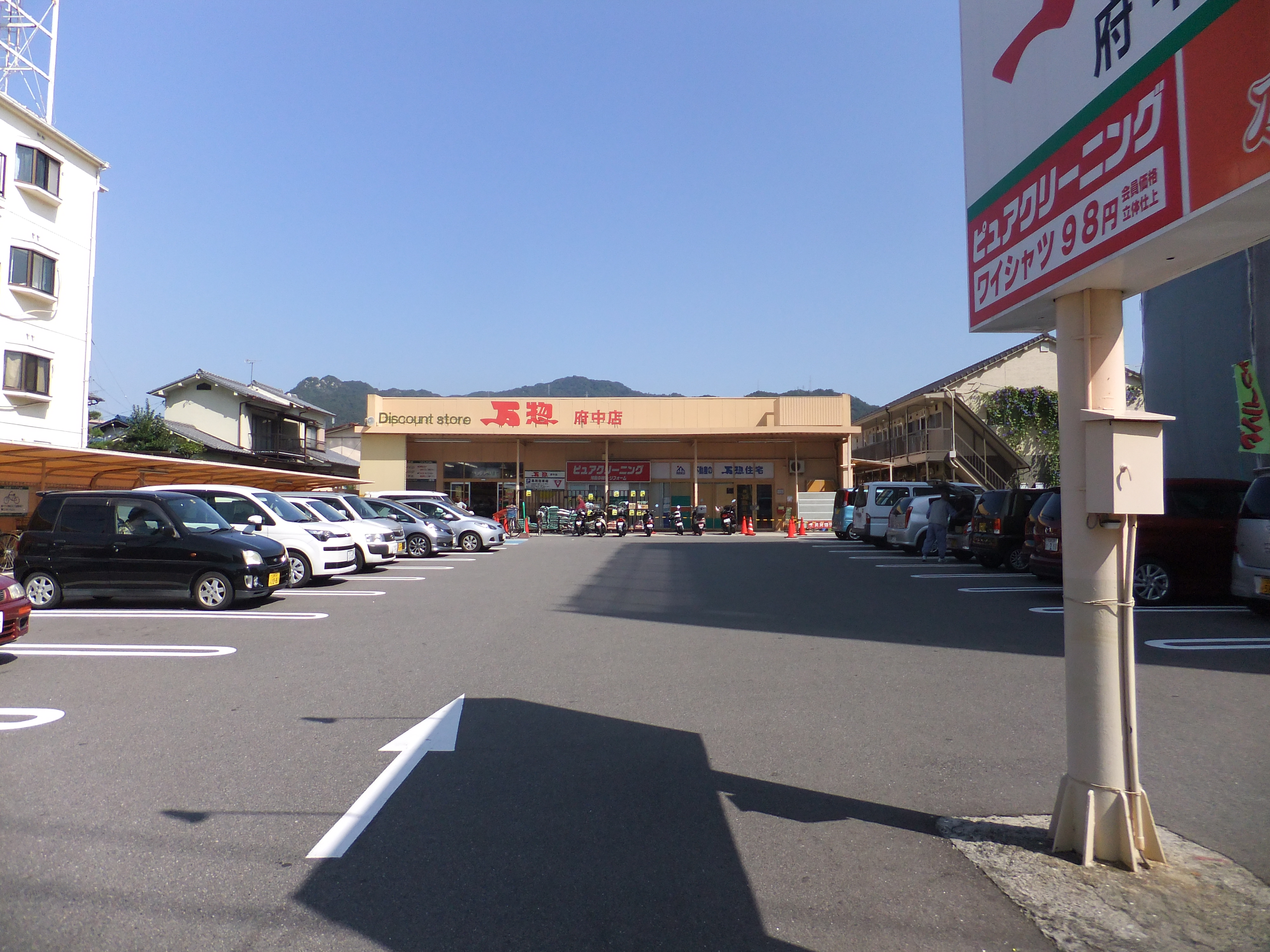 万惣府中店